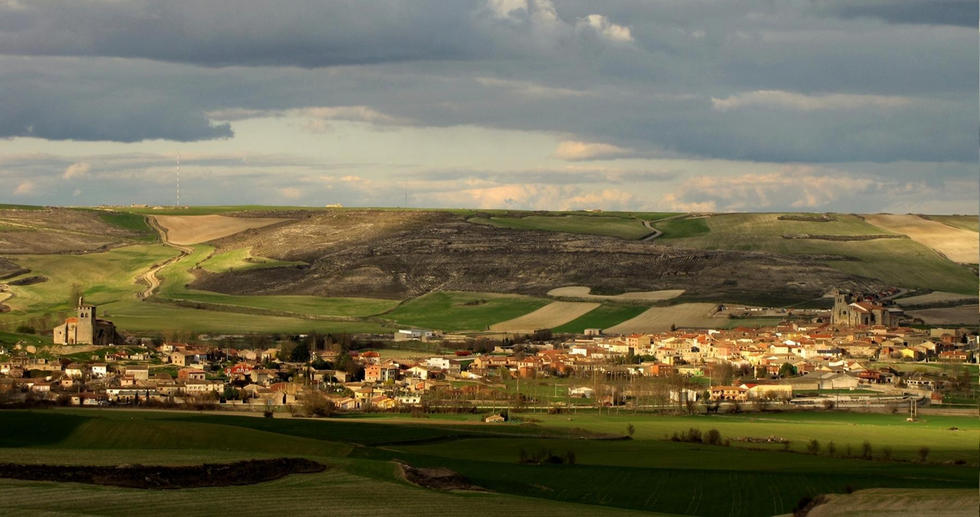 losbalbases